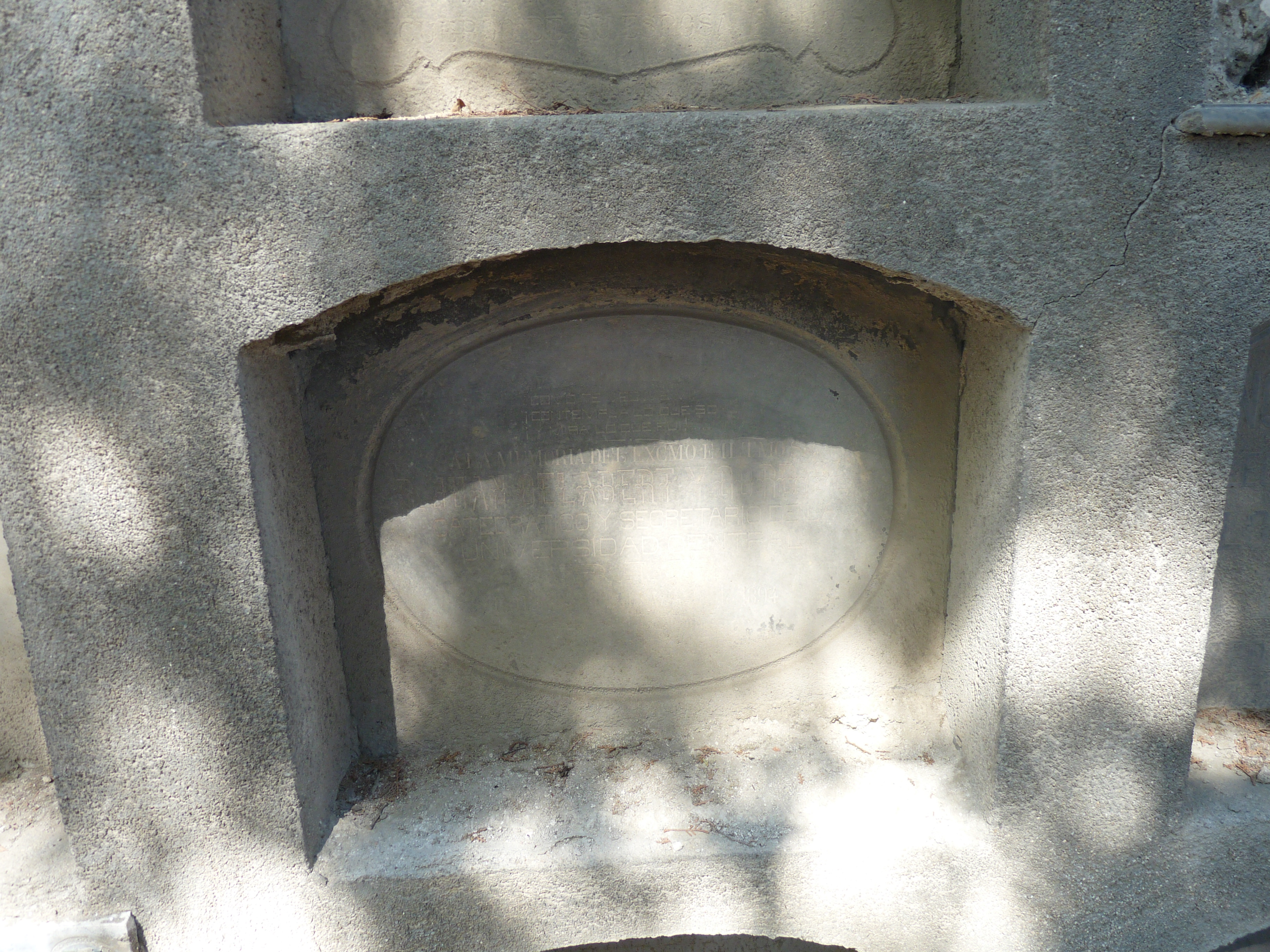 Tumba de Juan Gelabert y Gordiola, nicho en el patio de las Ánimas de la sacramental de Santa María.